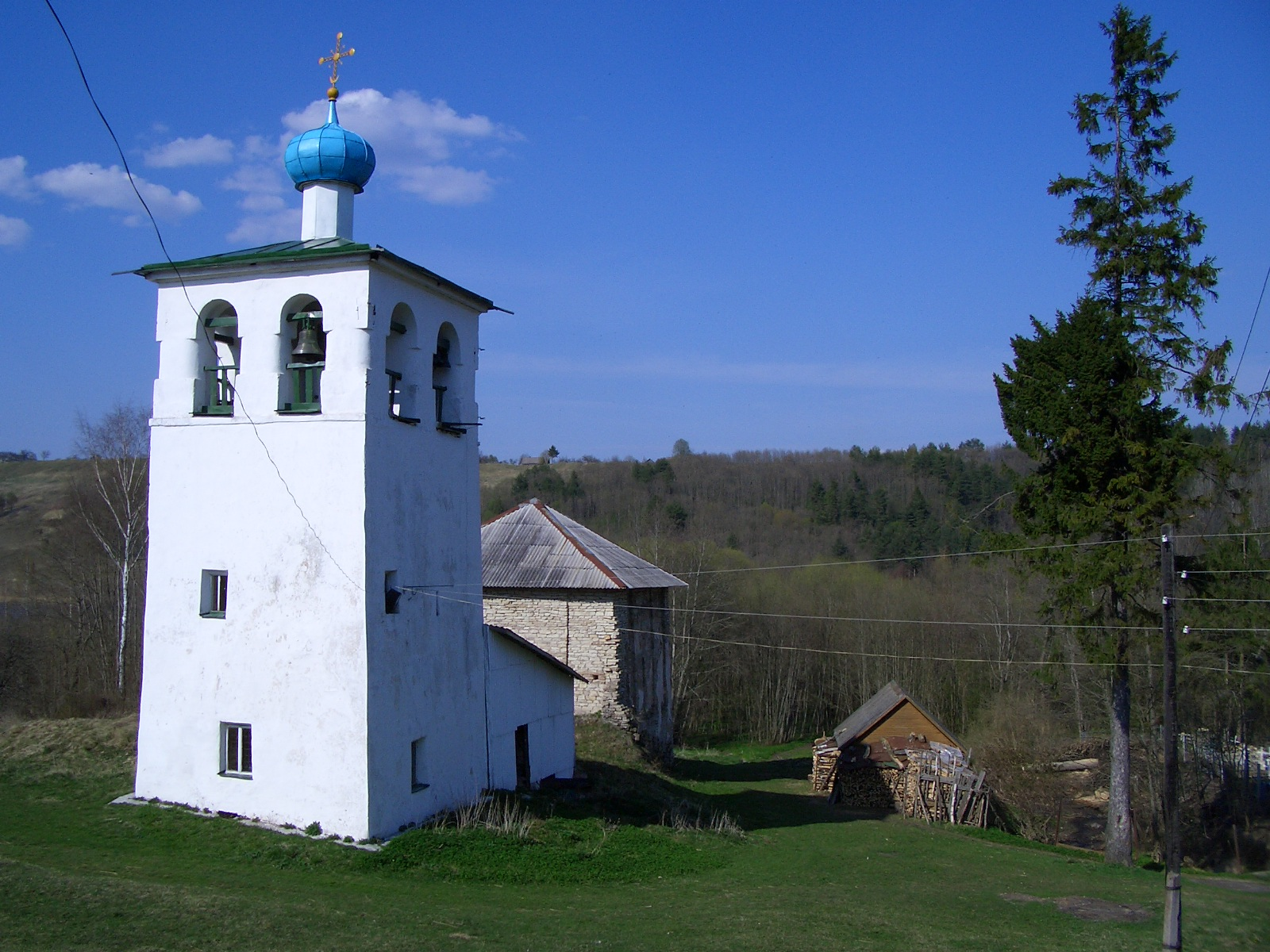 Ансамбль Мальского монастыря (Псковская область, Печоры, погост Малы, в 4-х км от села Старый Изборск)